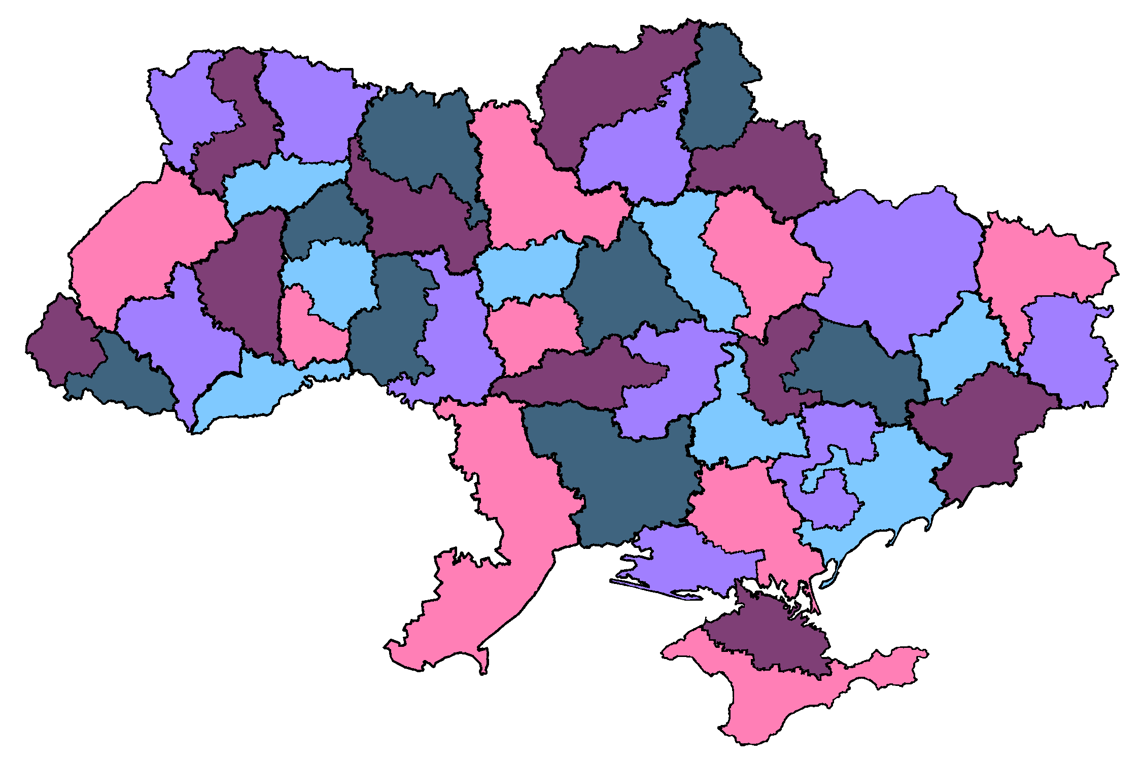 Єпархії УПЦ(МП)